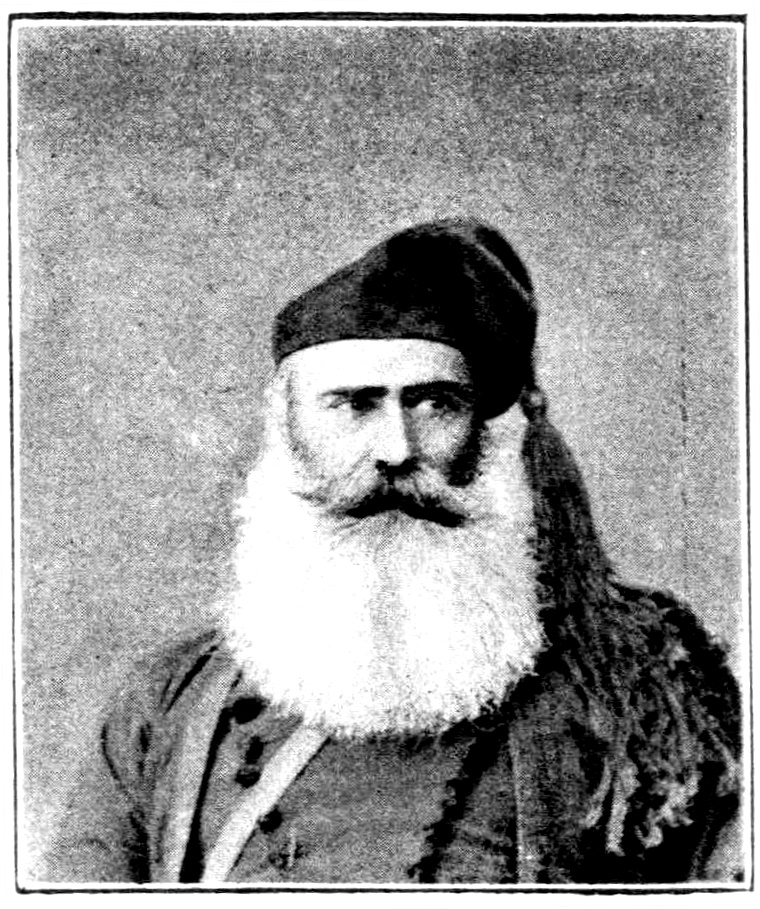 griechischer Freiheitskämpfer, 19. Jahrhundert